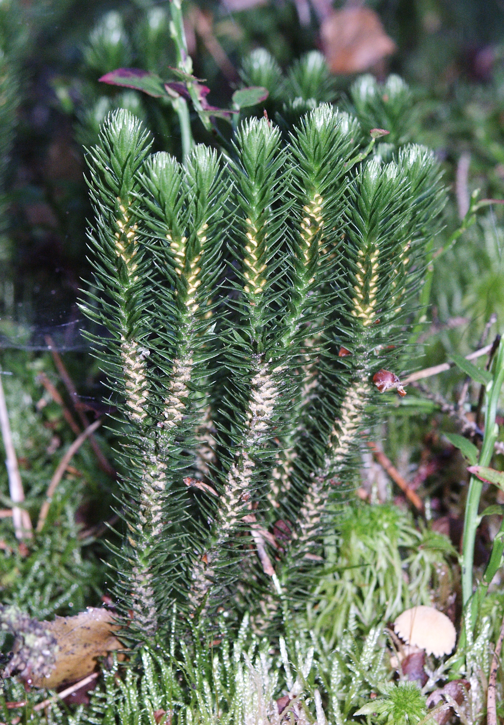 Huperzia selago, Virngrund, Germany